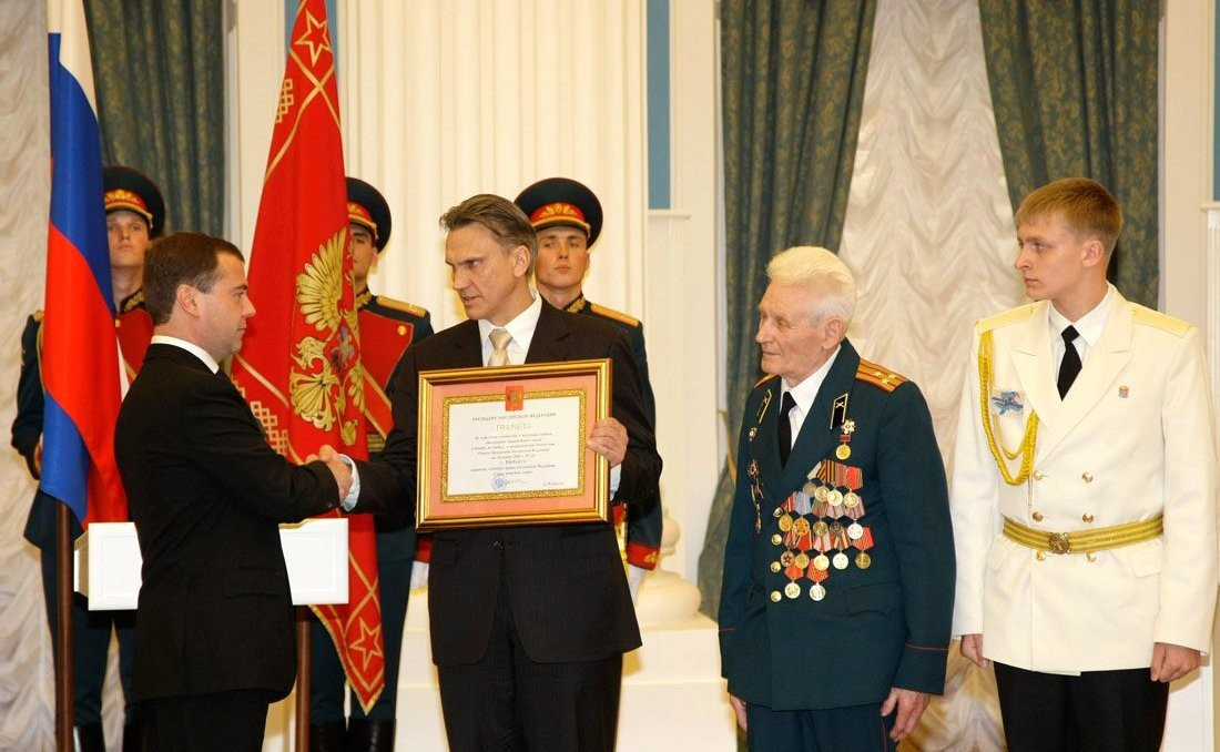 Вручение грамоты о присвоении почётного звания «Город воинской славы» представителям Выборга.